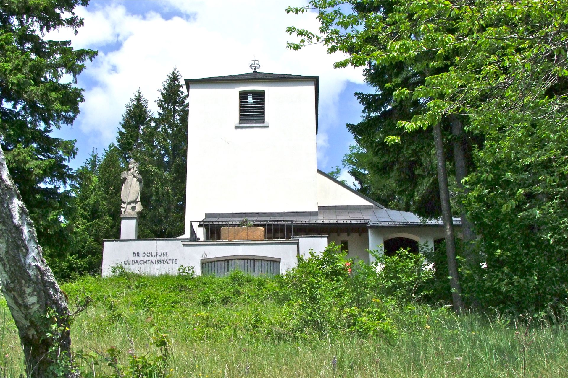 Engelbertkirche mit Dr. Dollfuß-Gedenkstätte